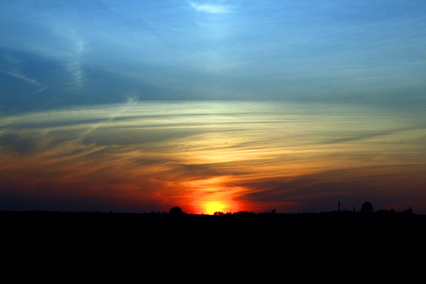 Sunset